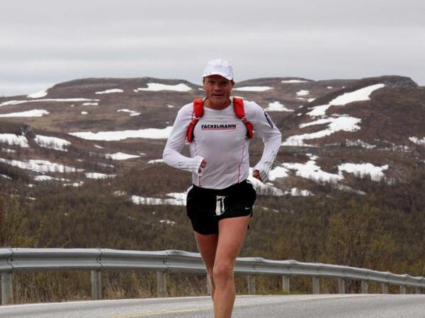 Robert Wimmer (rechts) führt die Läufer des 3. Coburger - Wintermarathons an Weitere Bilder und Bericht zum Coburger Wintermarathon 2007